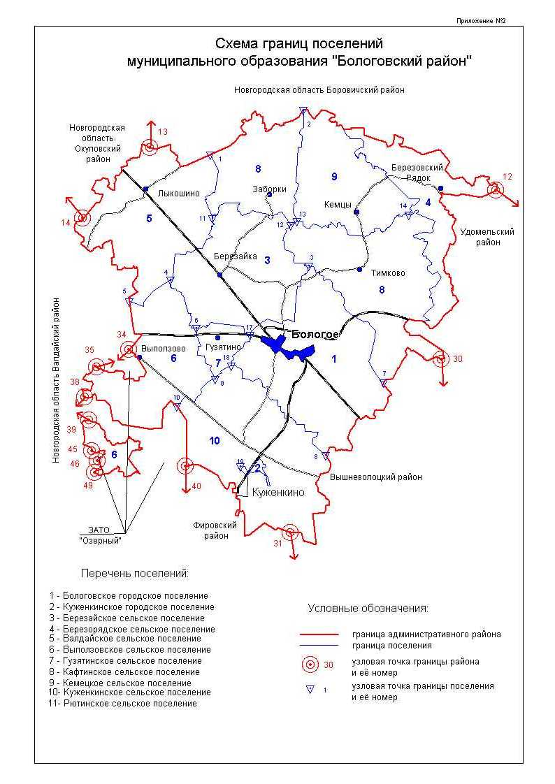 Приложение к закону Тверской области "Об установлении границ муниципальных образований, входящих в состав территории муниципального образования Тверской области "Бологовский район", и наделении их статусом городского, сельского поселения"